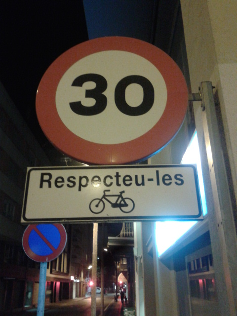 Límit de 30 km/h a Girona. Respecte a les bicicletes